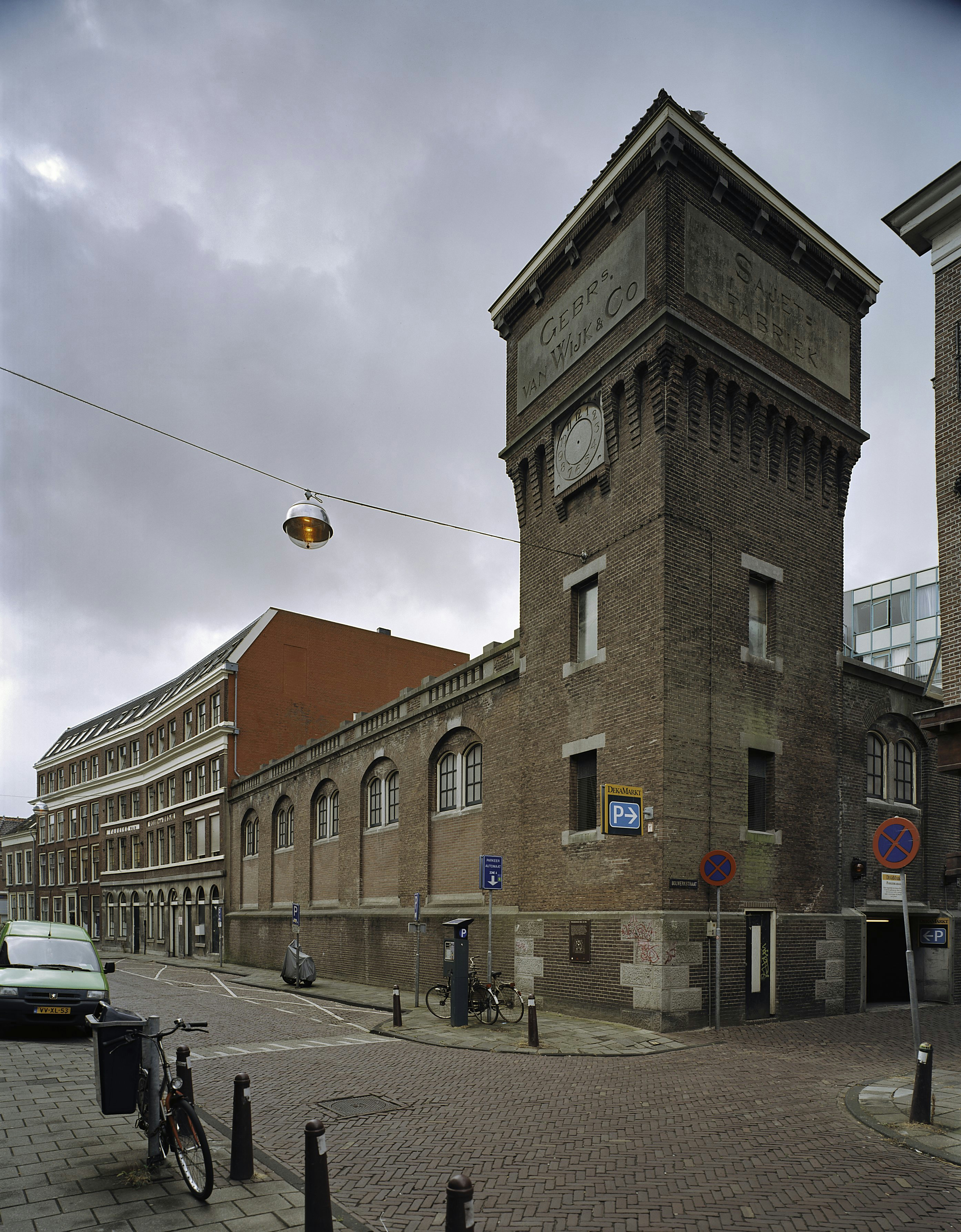 voormalig Wollendekenfabriek Van Wijk: Fabrieksgebouw, overzicht hoektoren (opmerking: Gefotografeerd voor Monumenten In Nederland Zuid-Holland)